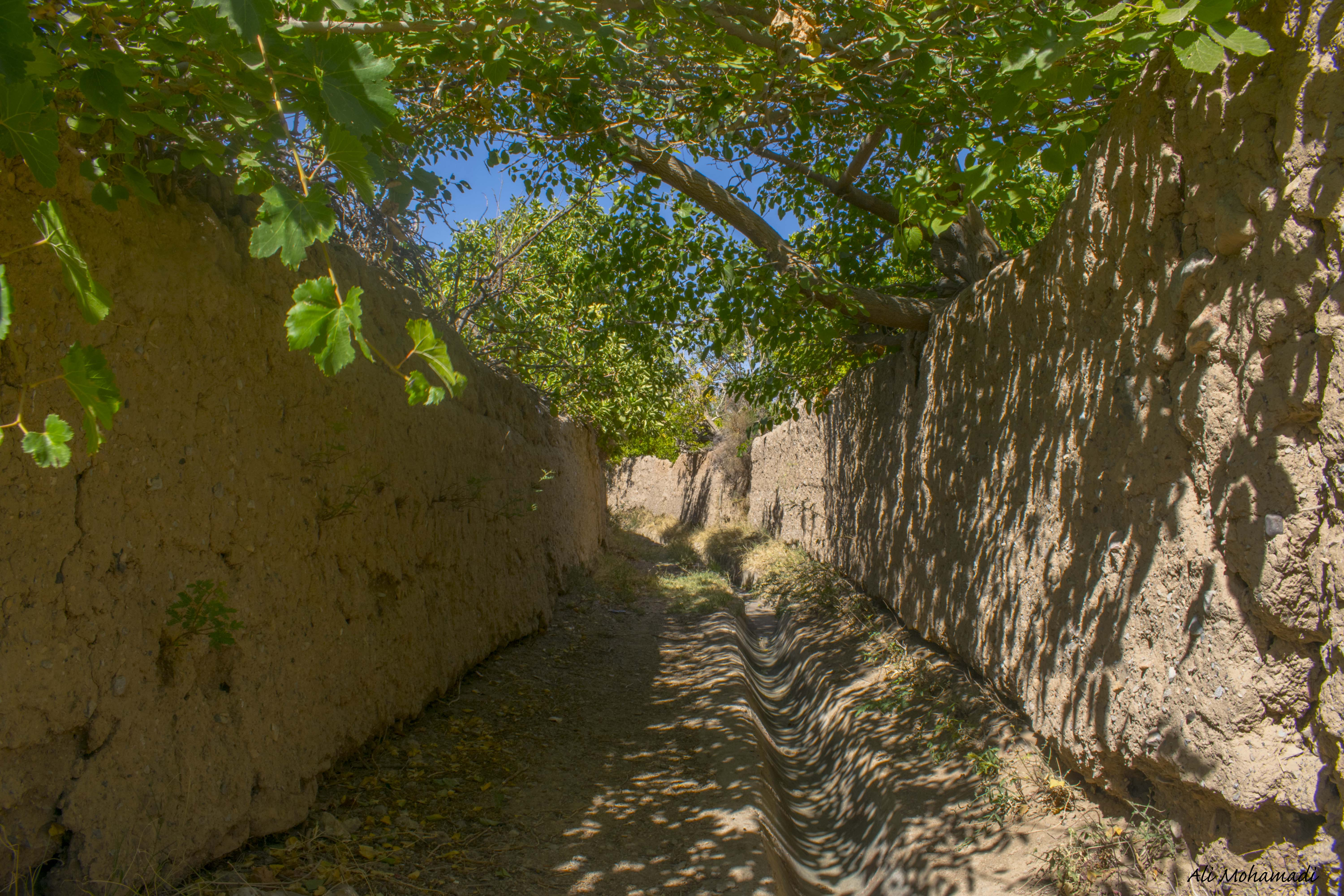 کوچه باغ ساغند